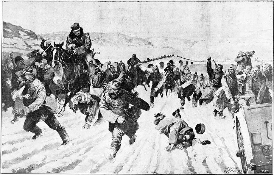 Covârșiți, un moment, de forțe superioare inamice, Sârbii, cărora le lipsiau și munițiunile, se retrag spre a se reforma prentru noua ofensivă care i-a dus la reluarea Belgradului.